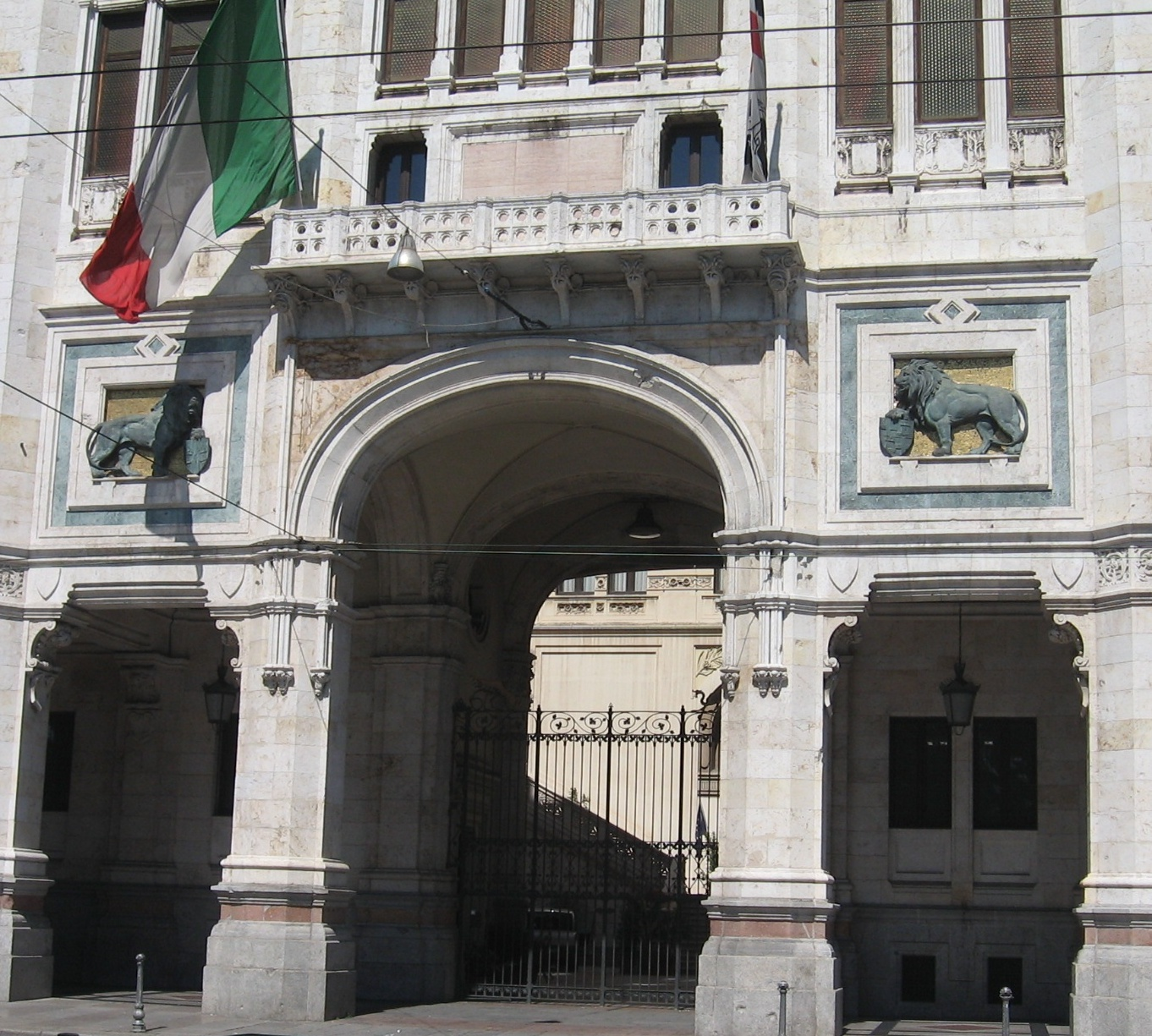 מראות העיר קאליארי סרדיניה